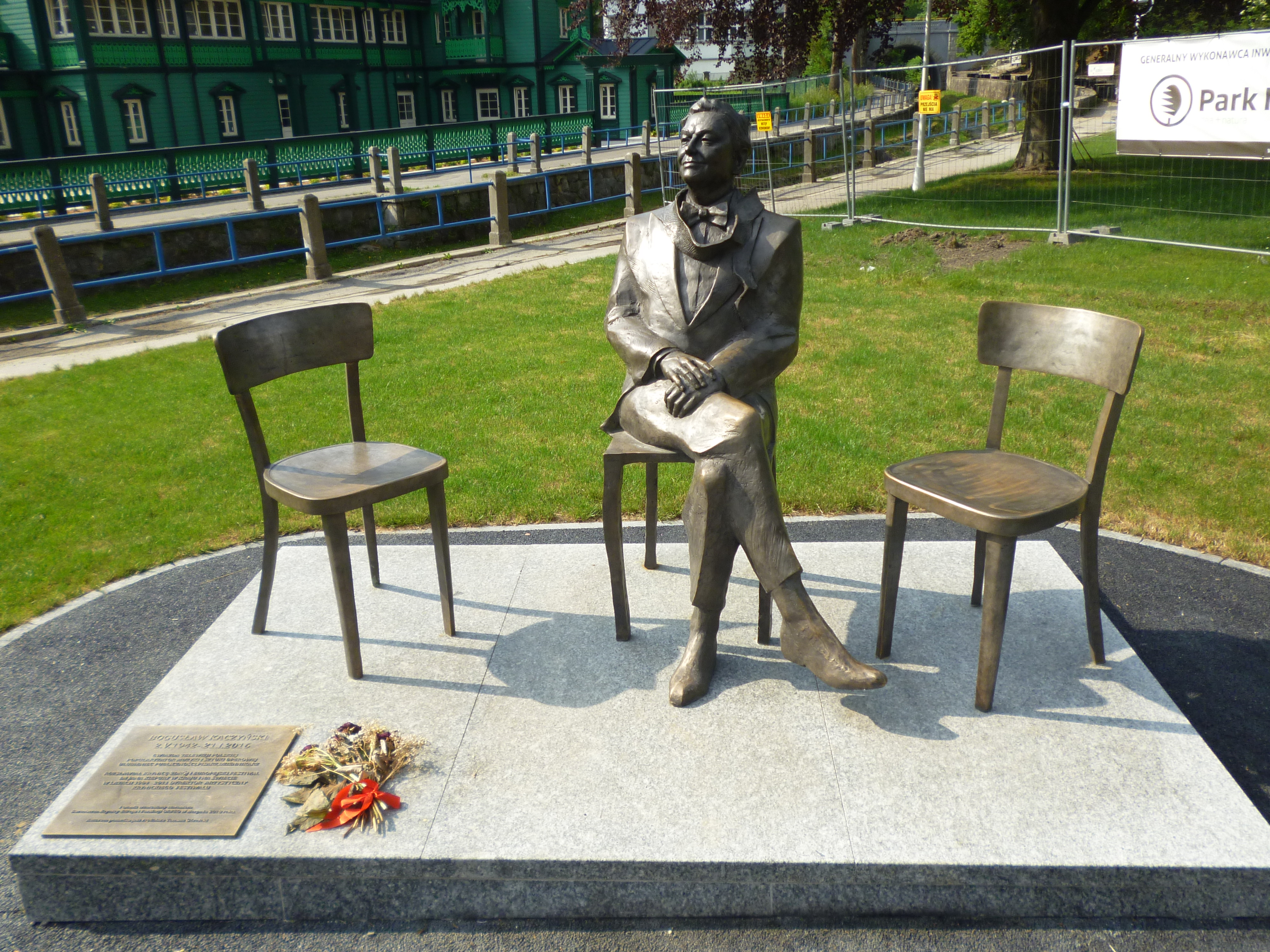 Pomnik Bogusława Kaczyńskiego projektu Tomasza Górnickiego znajduje się w Krynicy-Zdroju przy ulicy Nowotarskiego